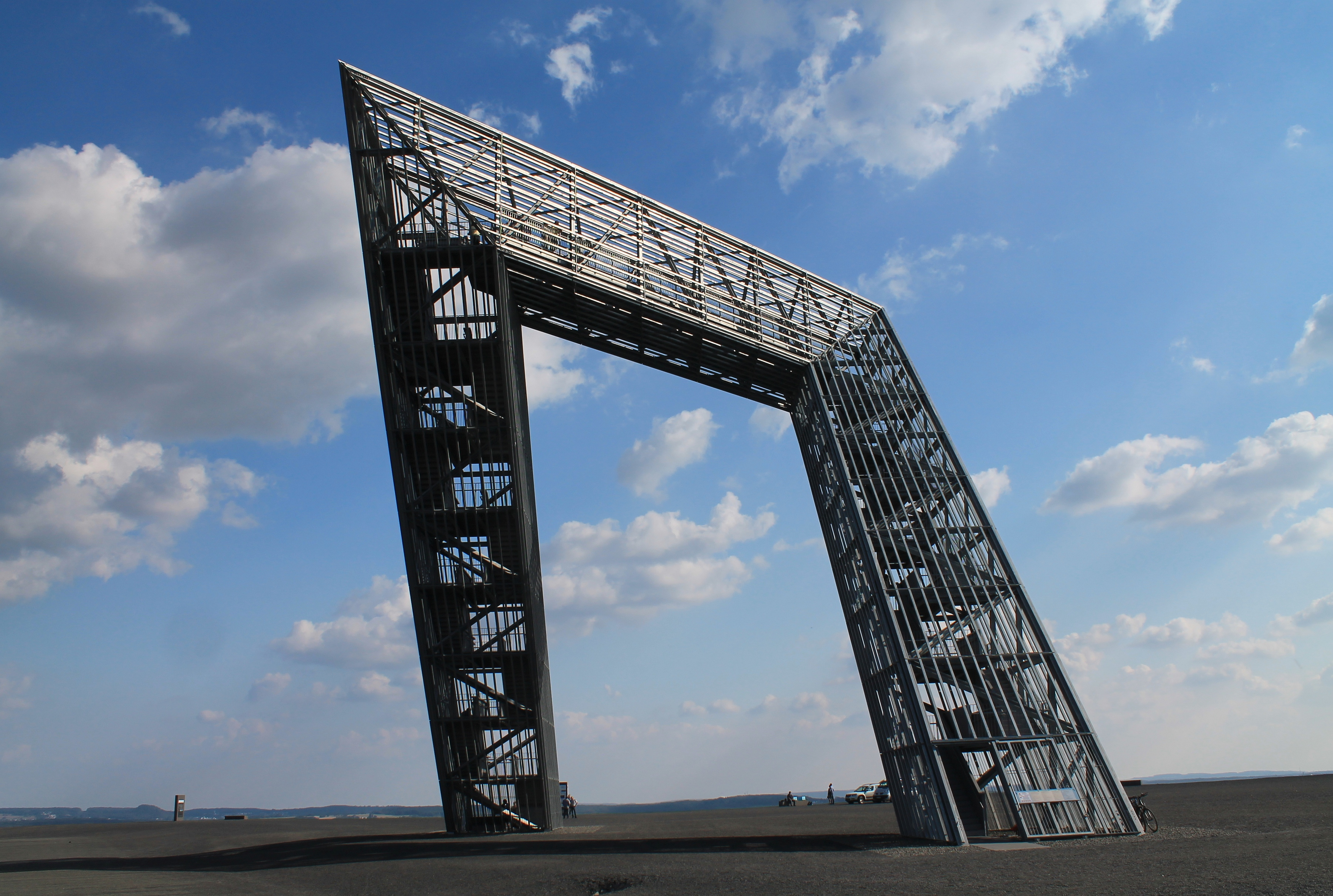 Das Saarpolygon auf der Halde Ensdorf.